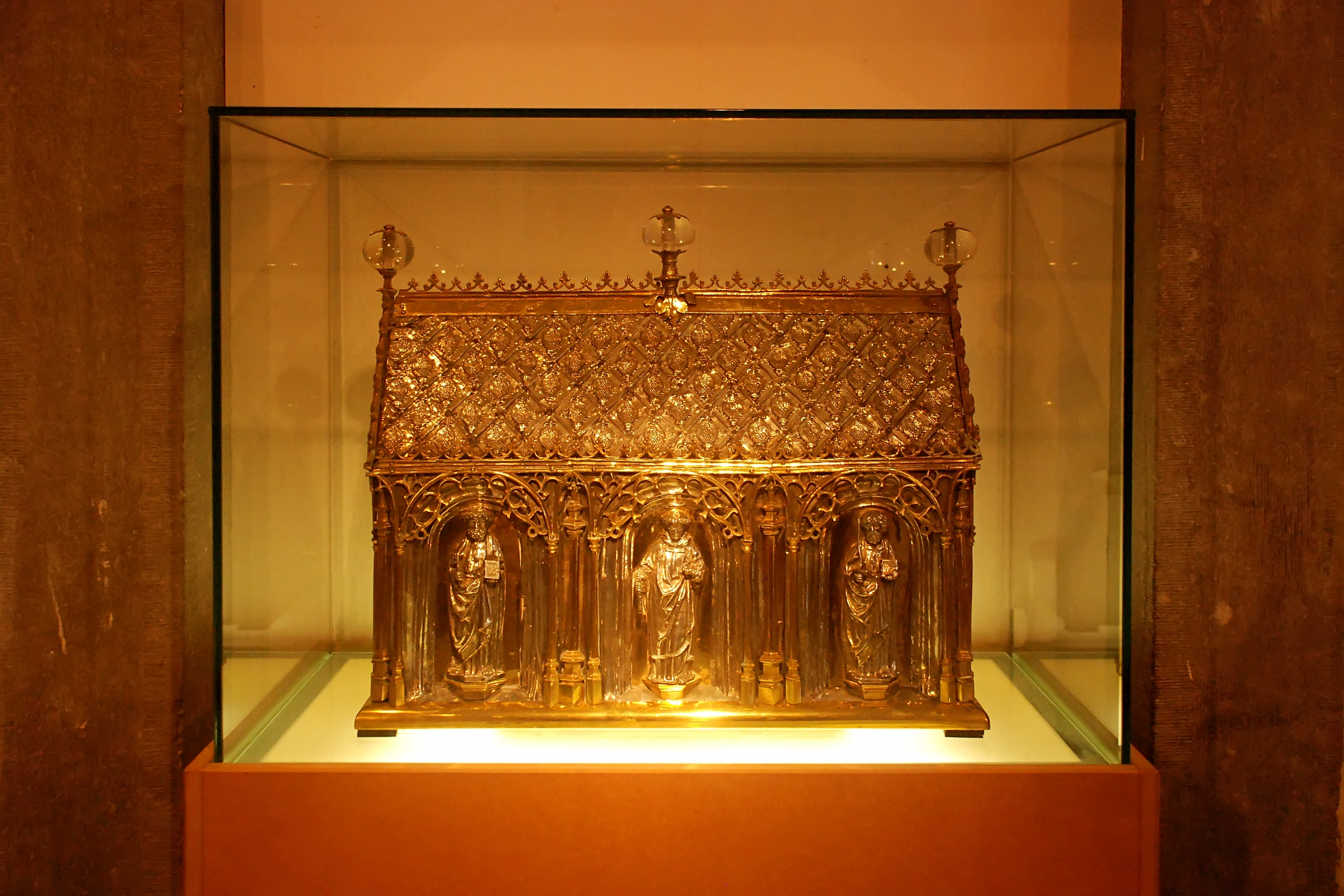 Belgique - Brabant wallon - Court-Saint-Étienne - Église Saint-Étienne